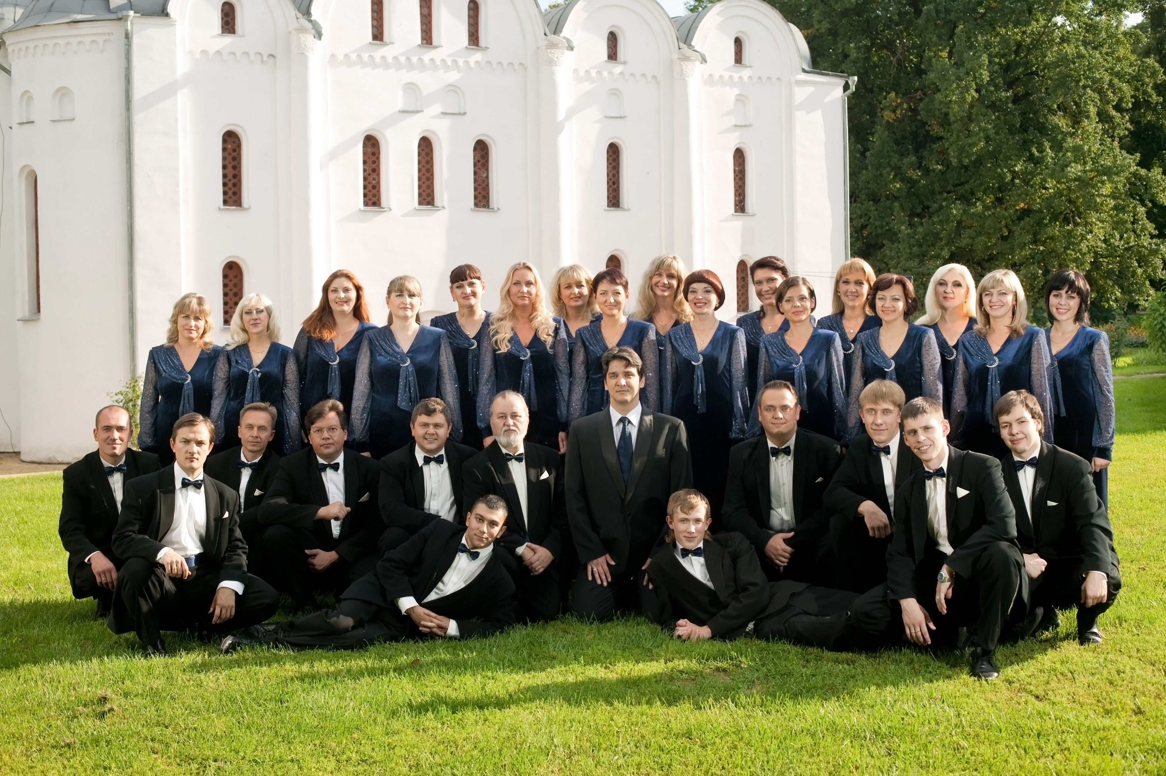 Академічний камерний хор ім. Д. Бортнянського. м.Чернігів.